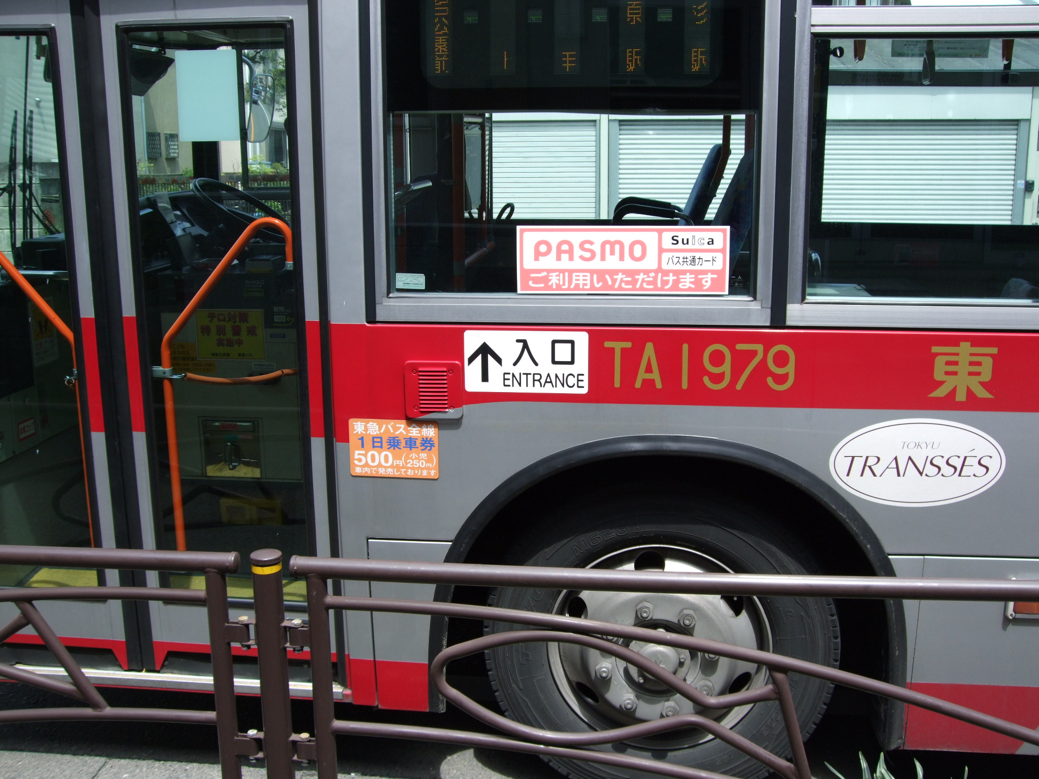 東急バス高津営業所 TA1979号車 車体左側の社番表示